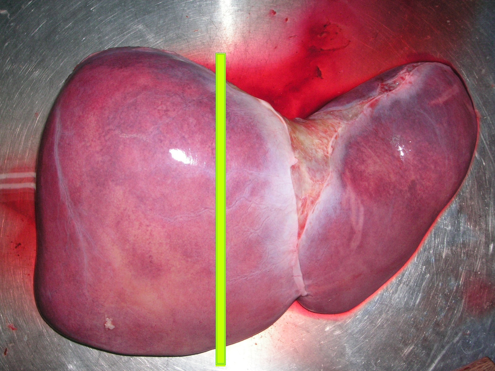 menselijke lever met markering van de functionele grens tussen de twee helften